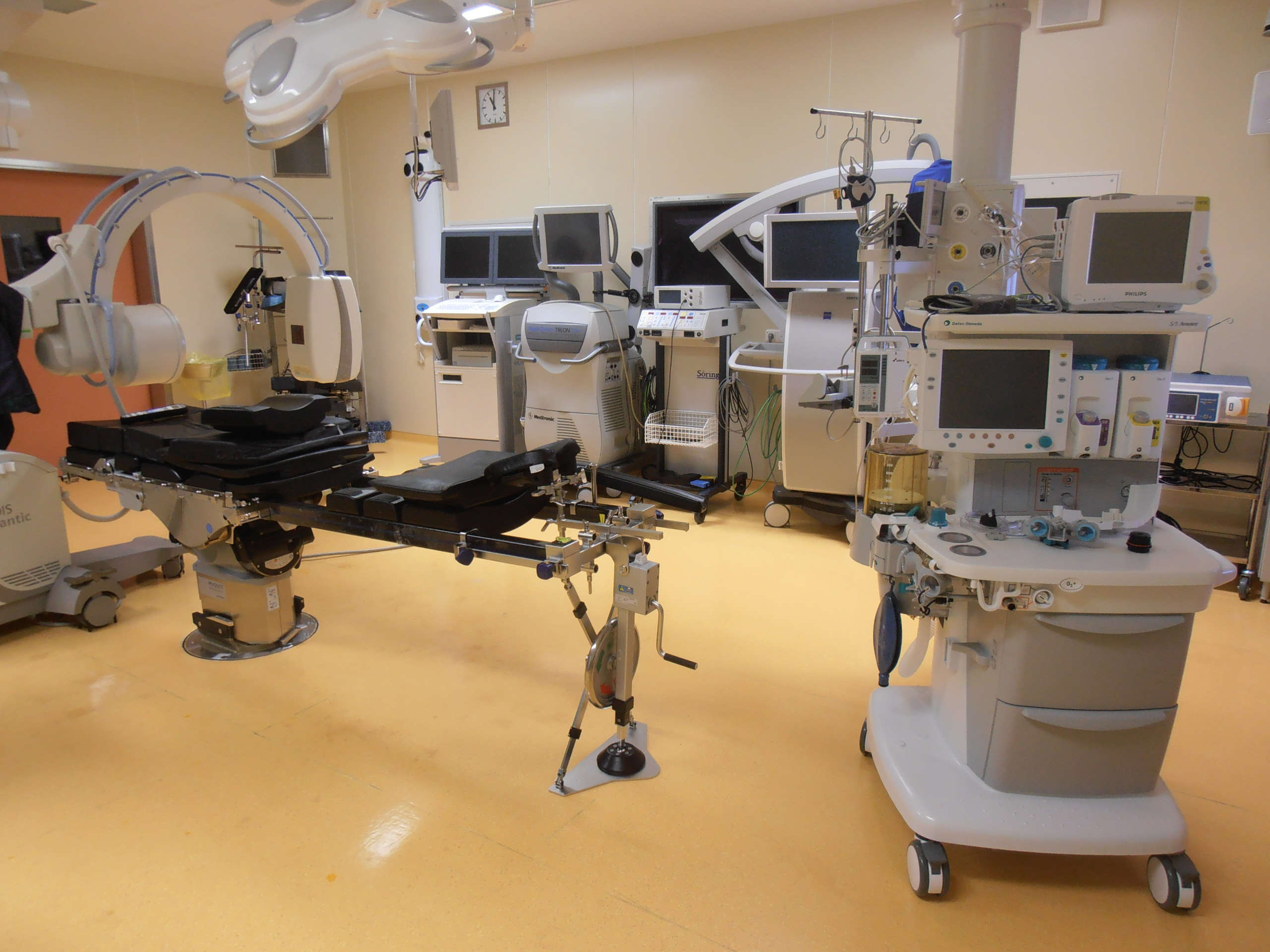 Операционный блок. Федеральный центр нейрохирургии в Тюмени (пос. Патрушево, Червишевский тракт, 4-й км, дом 5).